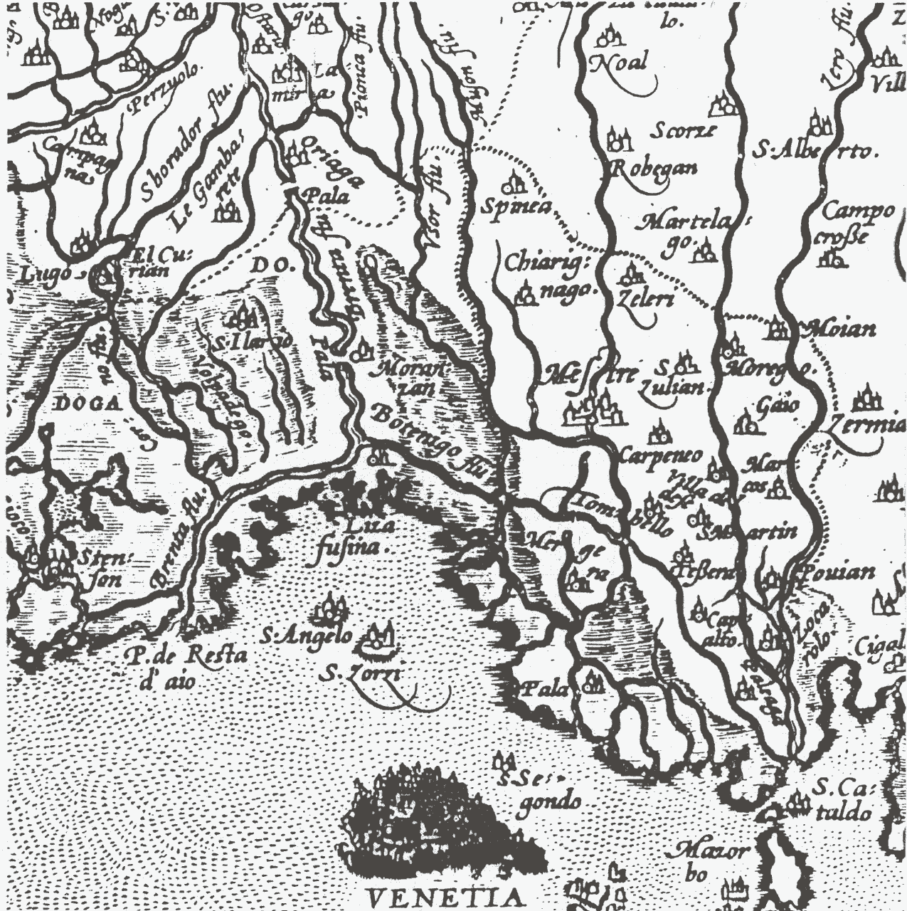 mappa parziale del XV secolo della foce della Brenta Vecchia e la zona dell'Abbazia di Sant'Ilario di Venezia.